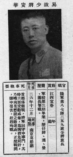 中文（台灣）: 抗戰軍人忠烈錄第一輯中的烈士遺像